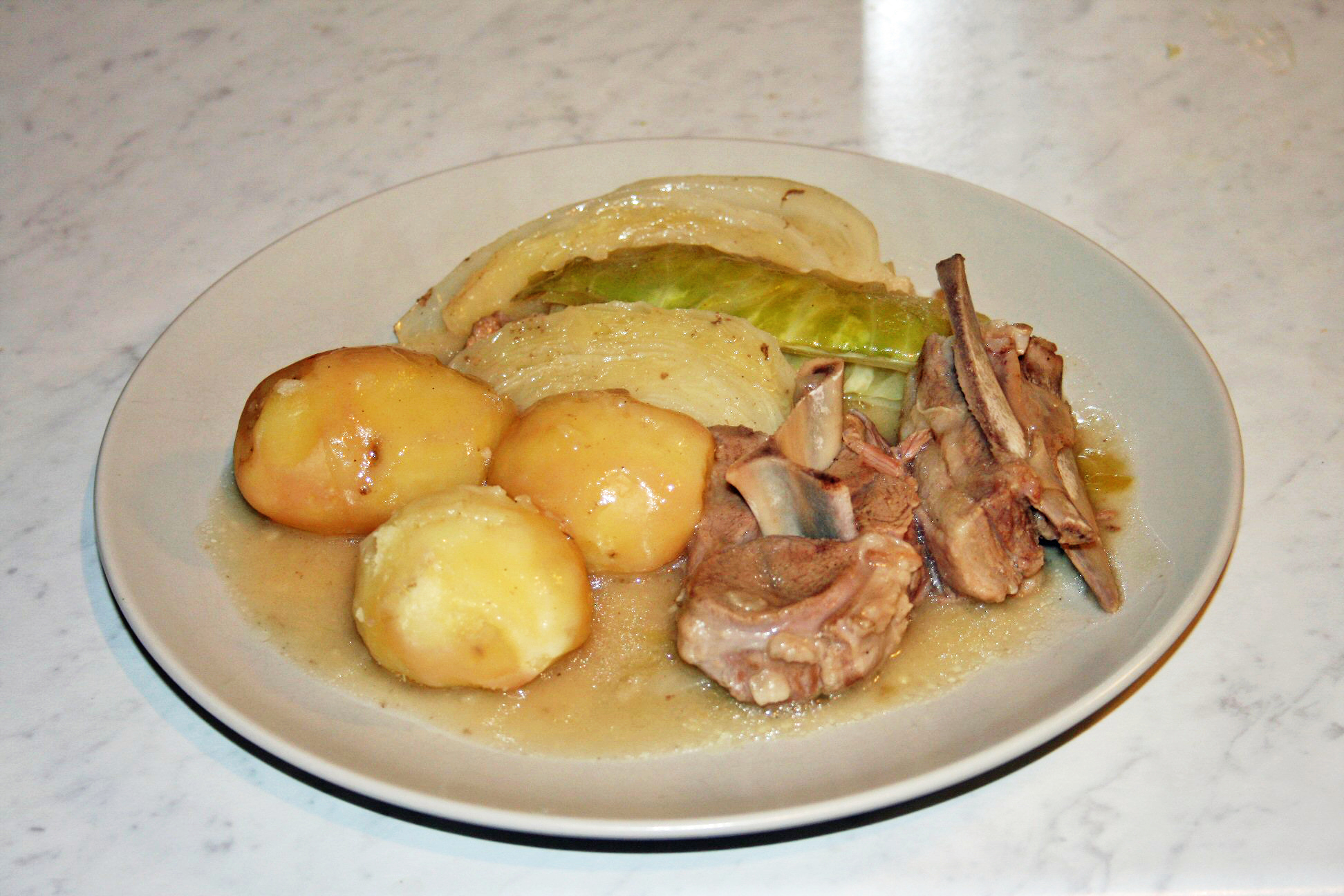 Får I kål . Typical Norwegian